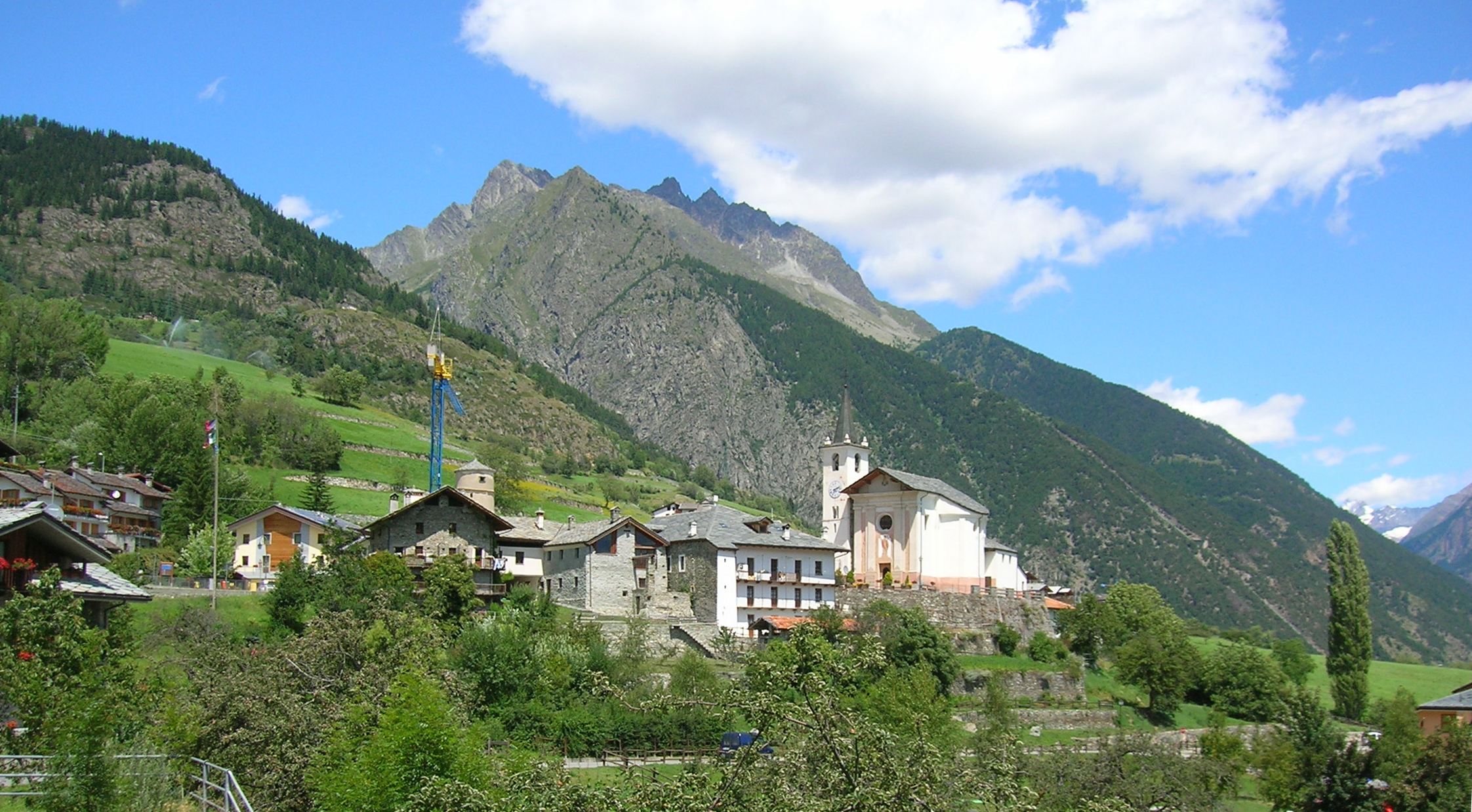 Panorama, Doues, Valle d'Aosta, Italia.